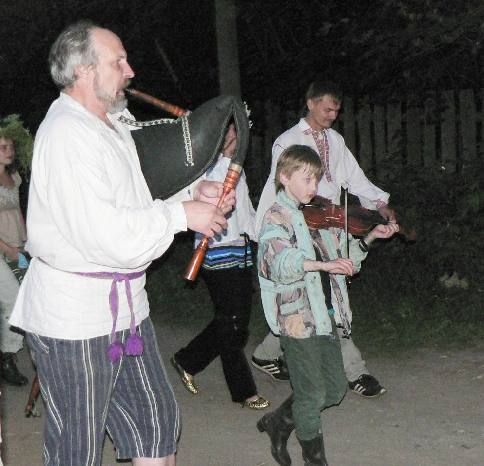 Dudziarz w Noc Świętojańską w Bobrze na Białorusi. Беларуская (тарашкевіца): Дудар на Купальлі ў Бабры.